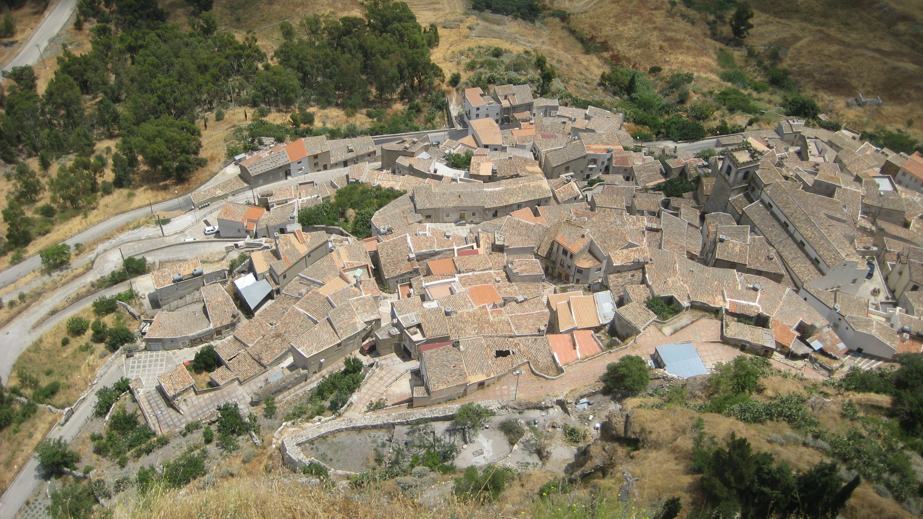 Il quartiere detto "Ràbato", a Sutera (provincia di Caltanissetta, Sicilia, Italia), visto dalla Montagna di S. Paolino. A destra è visibile la Chiesa madre di Sutera.